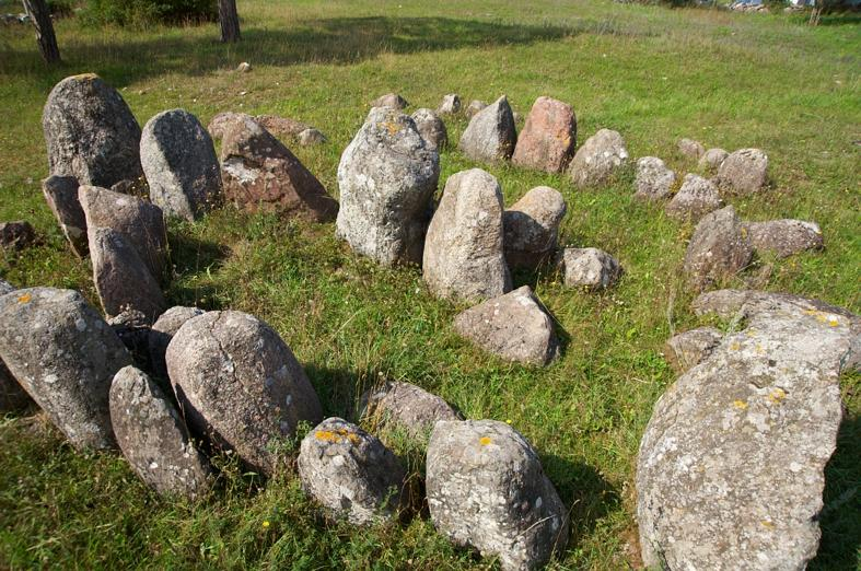 Lärbro 162:1. Gravfält bestående av 102 undersökta fornlämningar. Dessa utgöres av 94 runda stensättningar, 7 skeppssättningar och 1 brandgrop. Motiv: Lärbro 162:1 Nyckelord: Riksintressen Kategori: Stenkrets/domarring/skeppssättning Lärbro 162:1. Gravfält bestående av 102 undersökta fornlämningar. Dessa utgöres av 94 runda stensättningar, 7 skeppssättningar och 1 brandgrop. Lärbro 162:1.